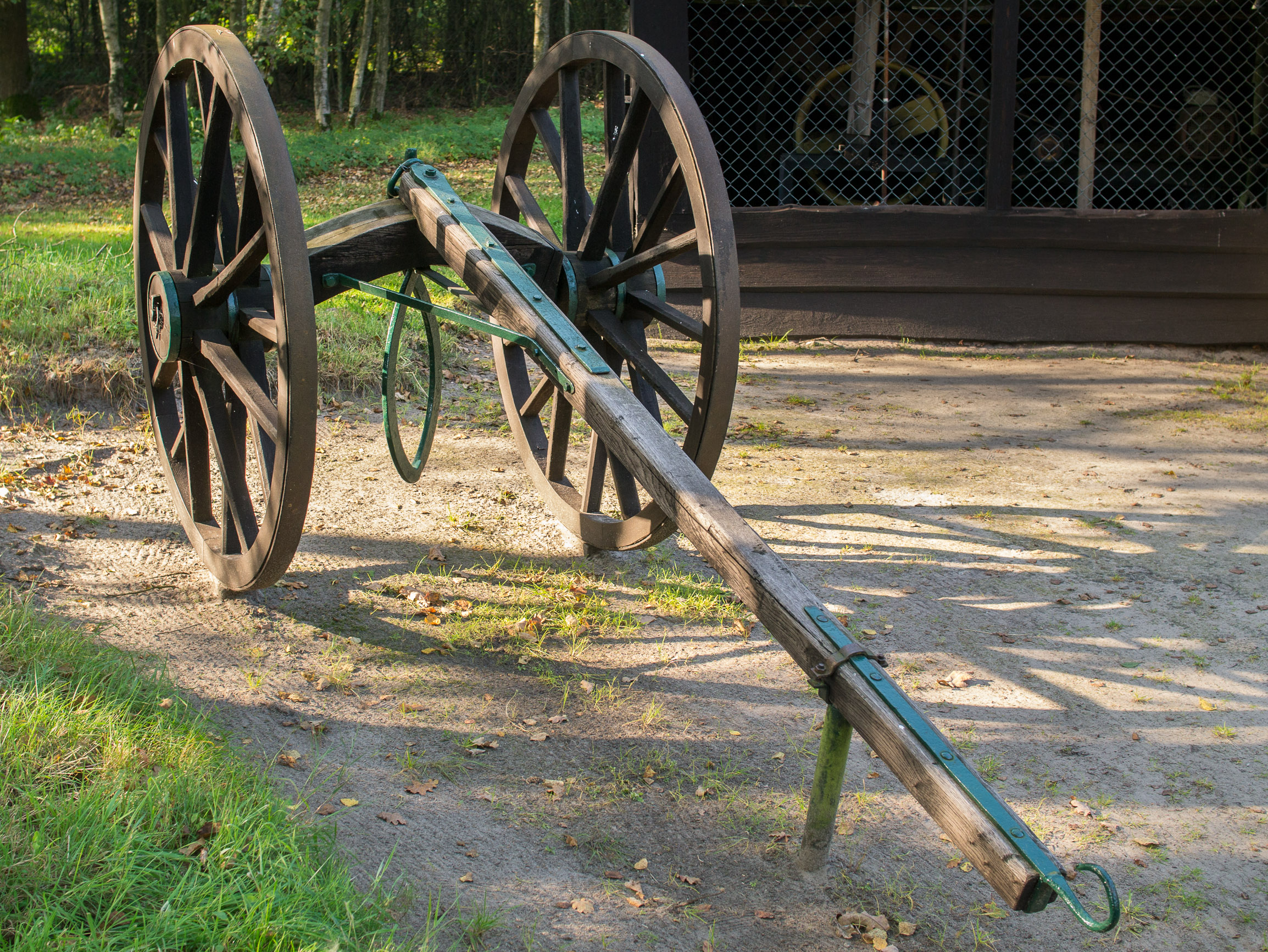 Openluchtmuseum Ellert en Bammert te Schoonoord - Malle Jan